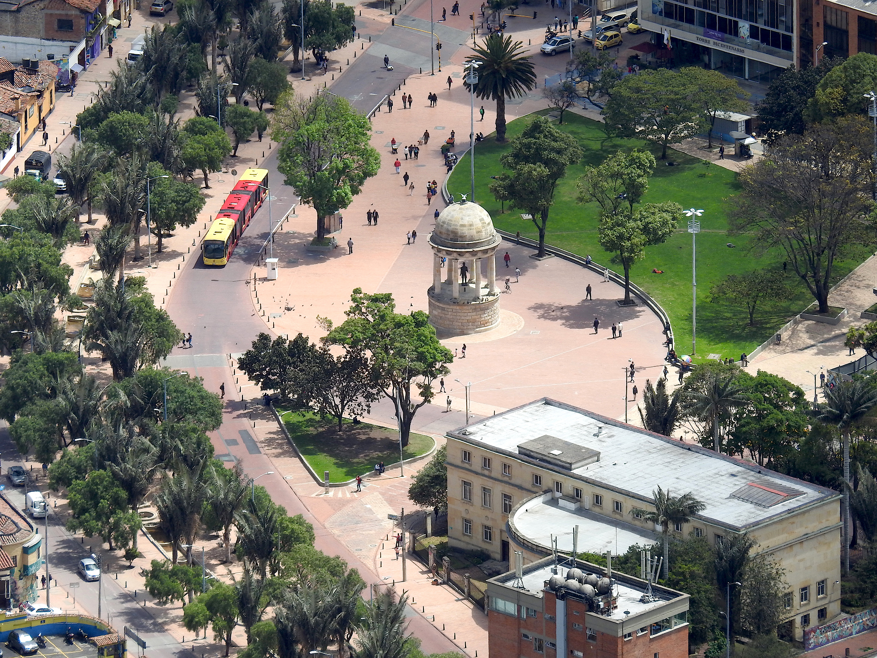 En el centro de la ciudad de Bogotá se encuentra el Parque de los Periodista, foto tomada desde el Cerro de Monserrate Esta fotografía fue tomada en un área protegida de Colombia con el código 0000 del RUNAP.